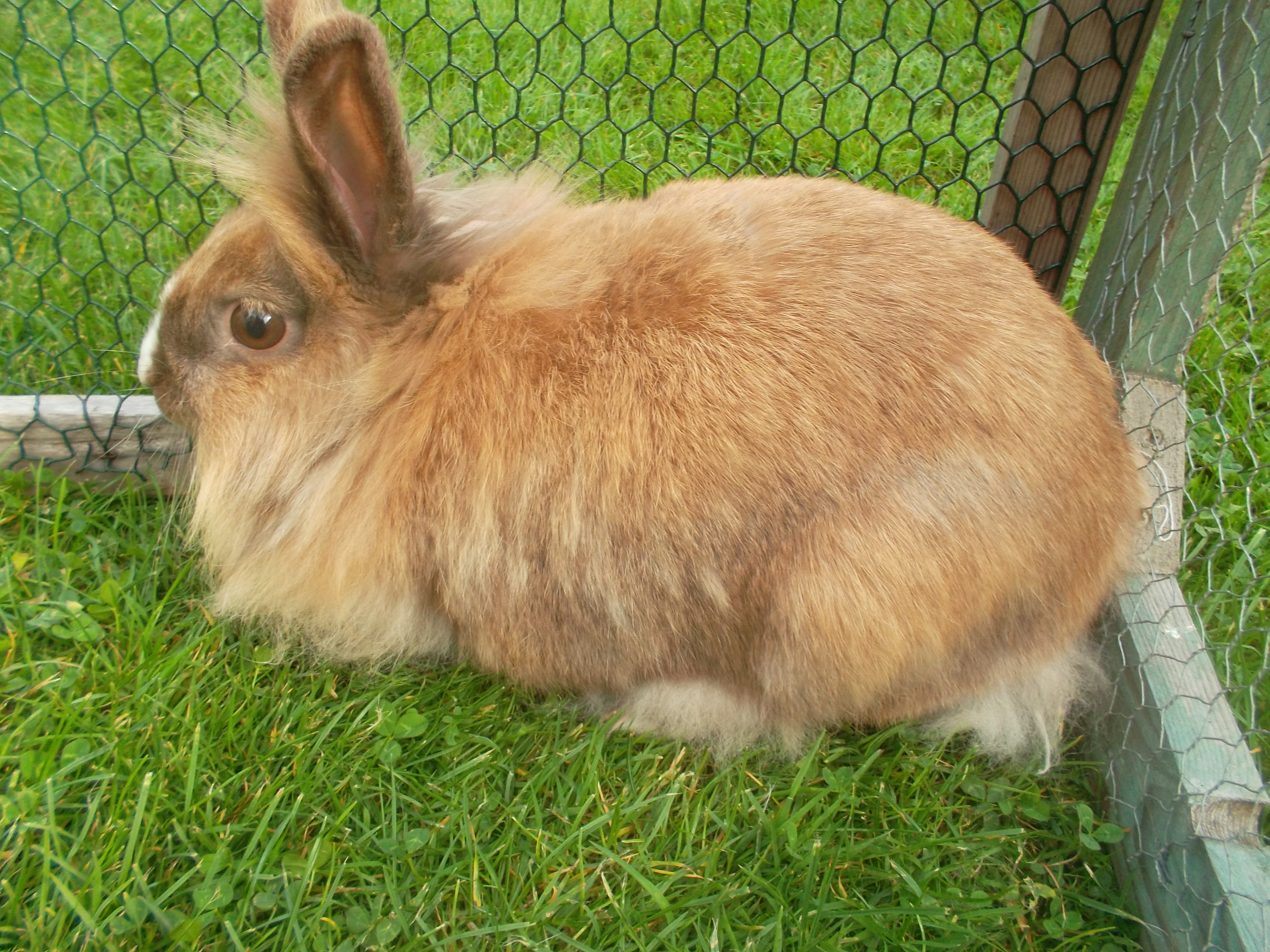 ein Löwenkopfkaninchen auf der Wiese aufgenommen im August 2015